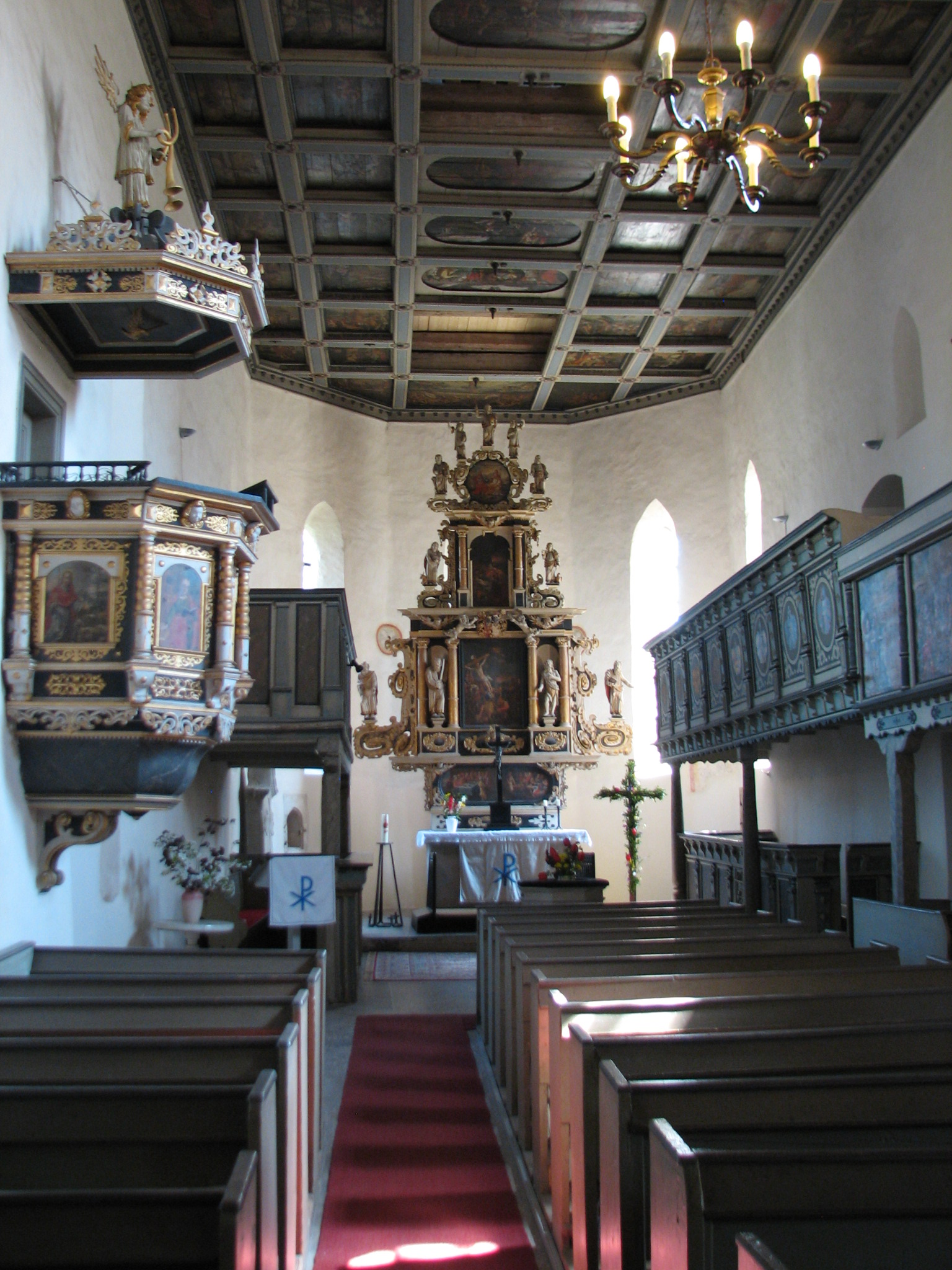 Innenansicht (Foto vom April 2019)